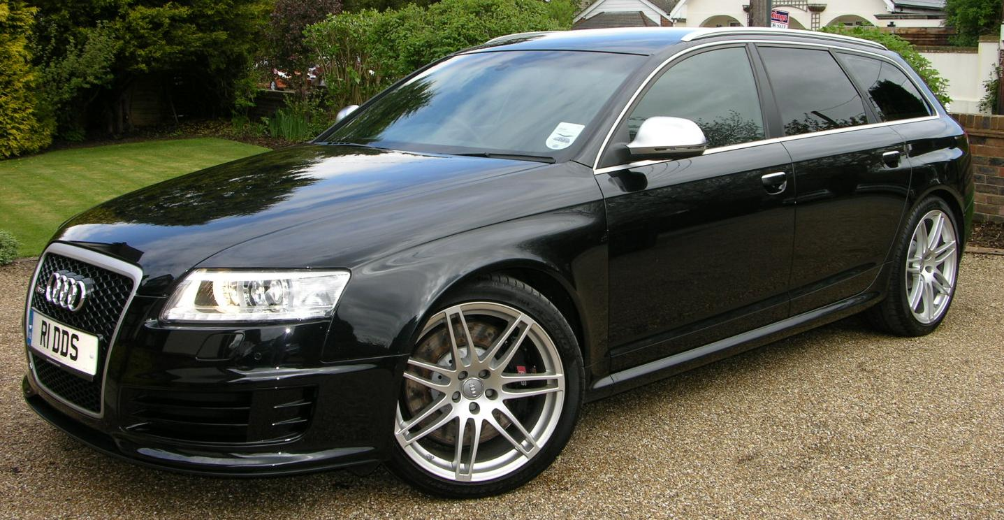 2008 Audi RS6